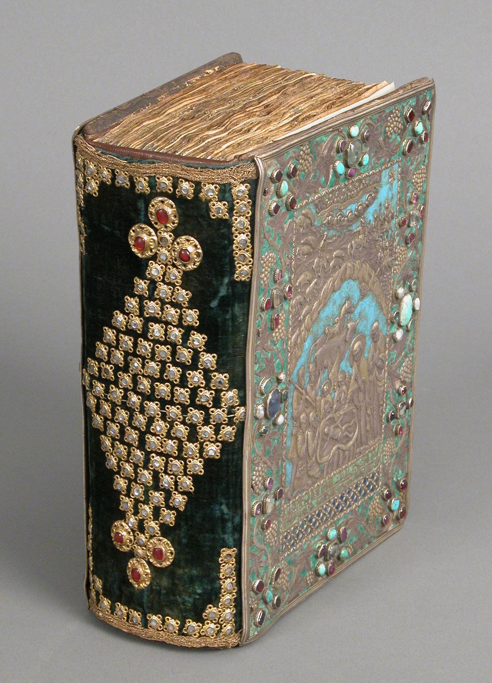 Illustrated manuscript; Codices